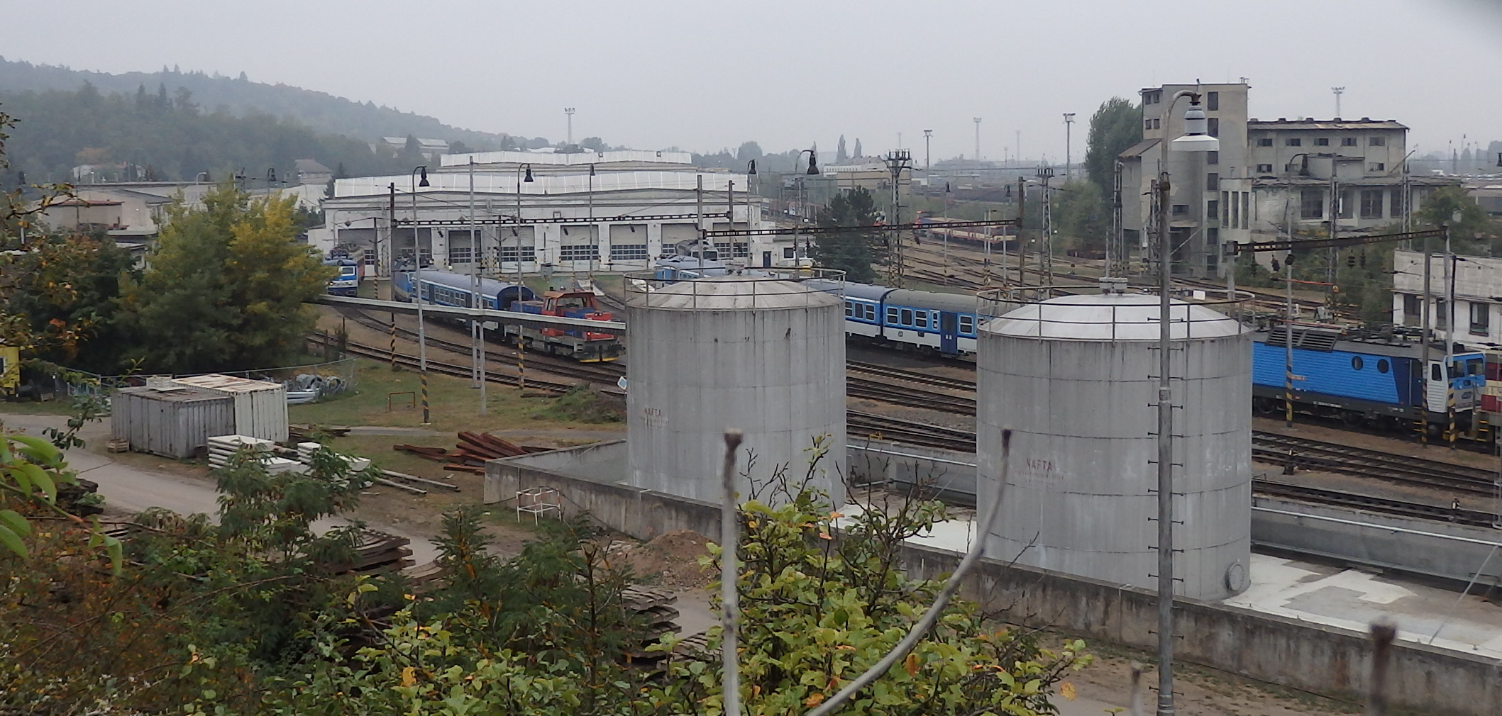 Depo kolejových vozidel Brno, provozní jednotka Brno-Maloměřice